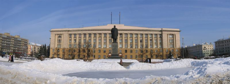 Здание правительства Пензенской области